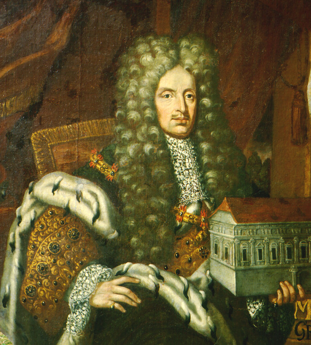 vévoda krumlovský